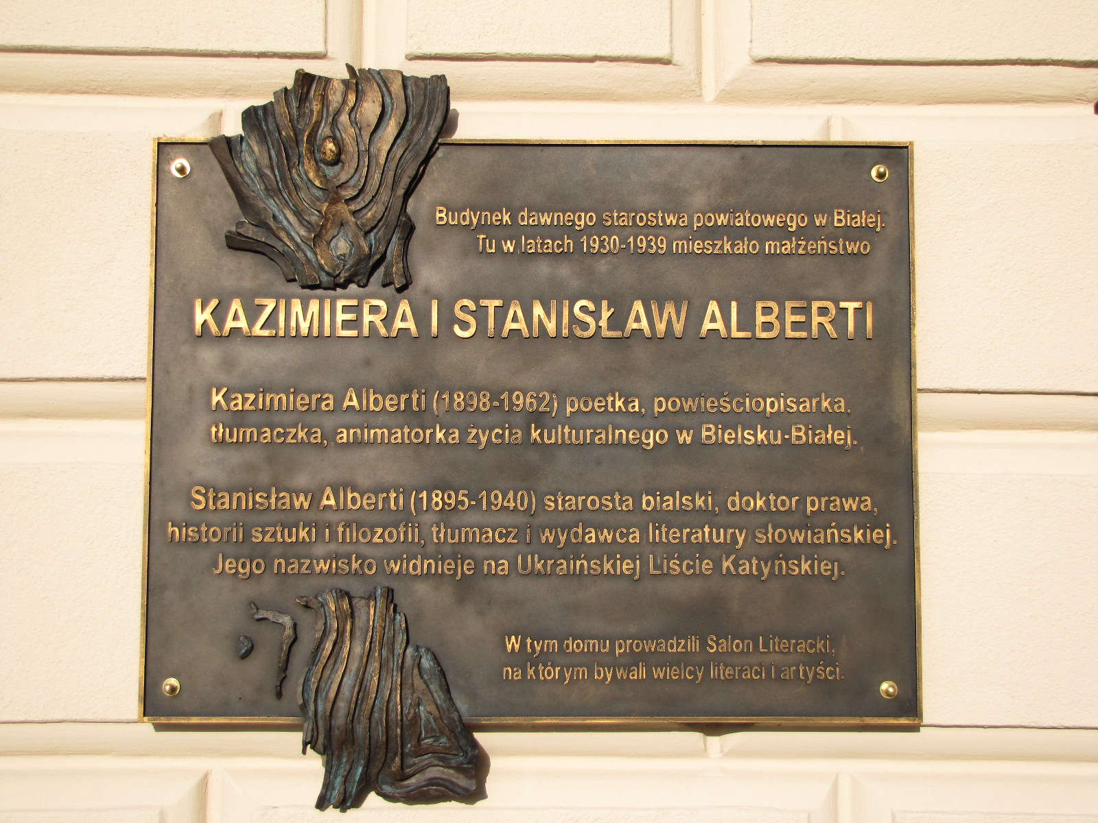 Tablica pamiątkowa odsłonięta 26.11.2009